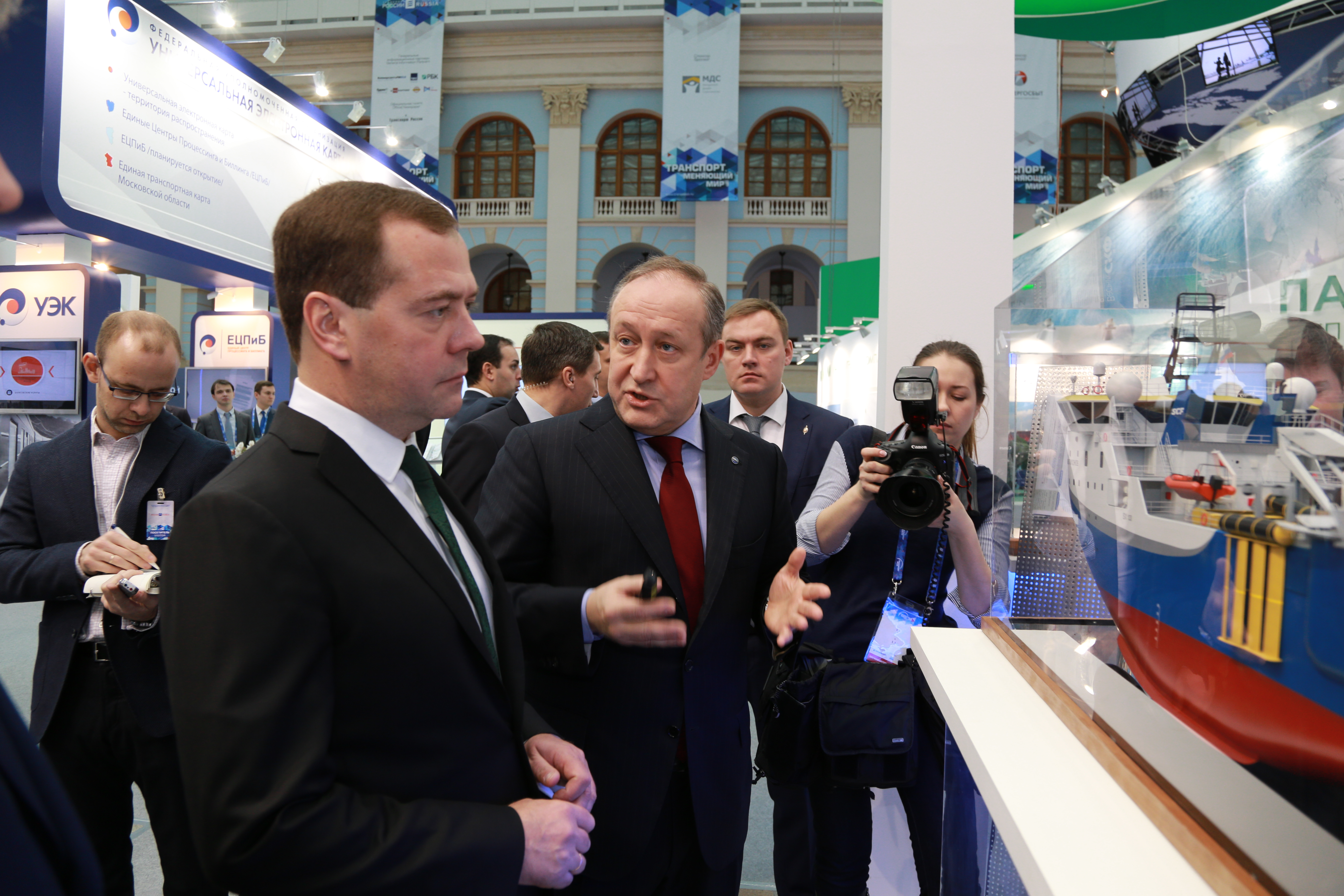 Сергей Оттович Франк и Дмитрий Анатольевич Медведев на выставке